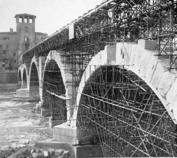 Ricostruzione di Ponte Pietra a Verona, dopo essere stato demolito dai soldati tedeschi in ritirata (il 25 aprile 1945) in seguito alla fine della seconda guerra mondiale